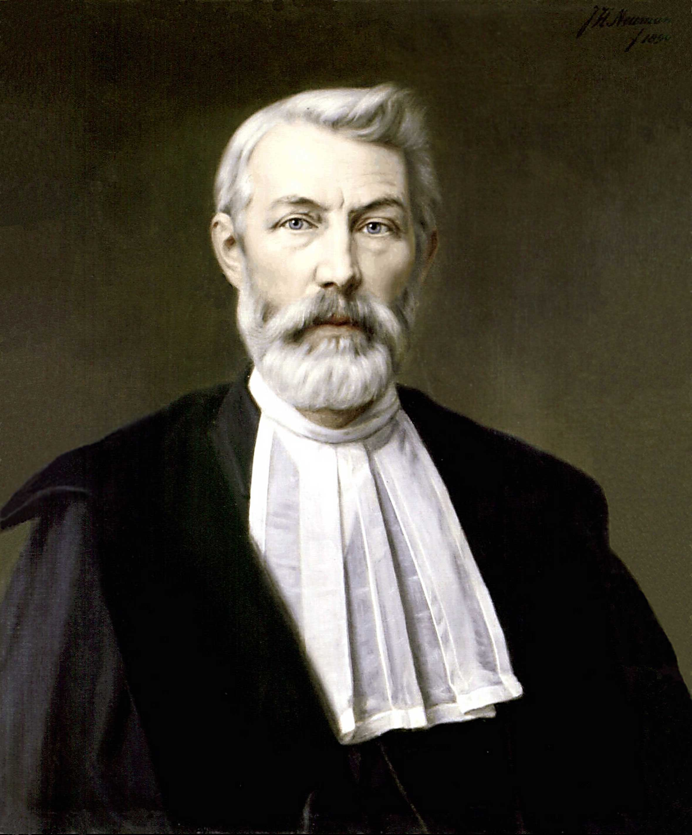 Pieter de Jong (1832-1890), Dutch orientalist